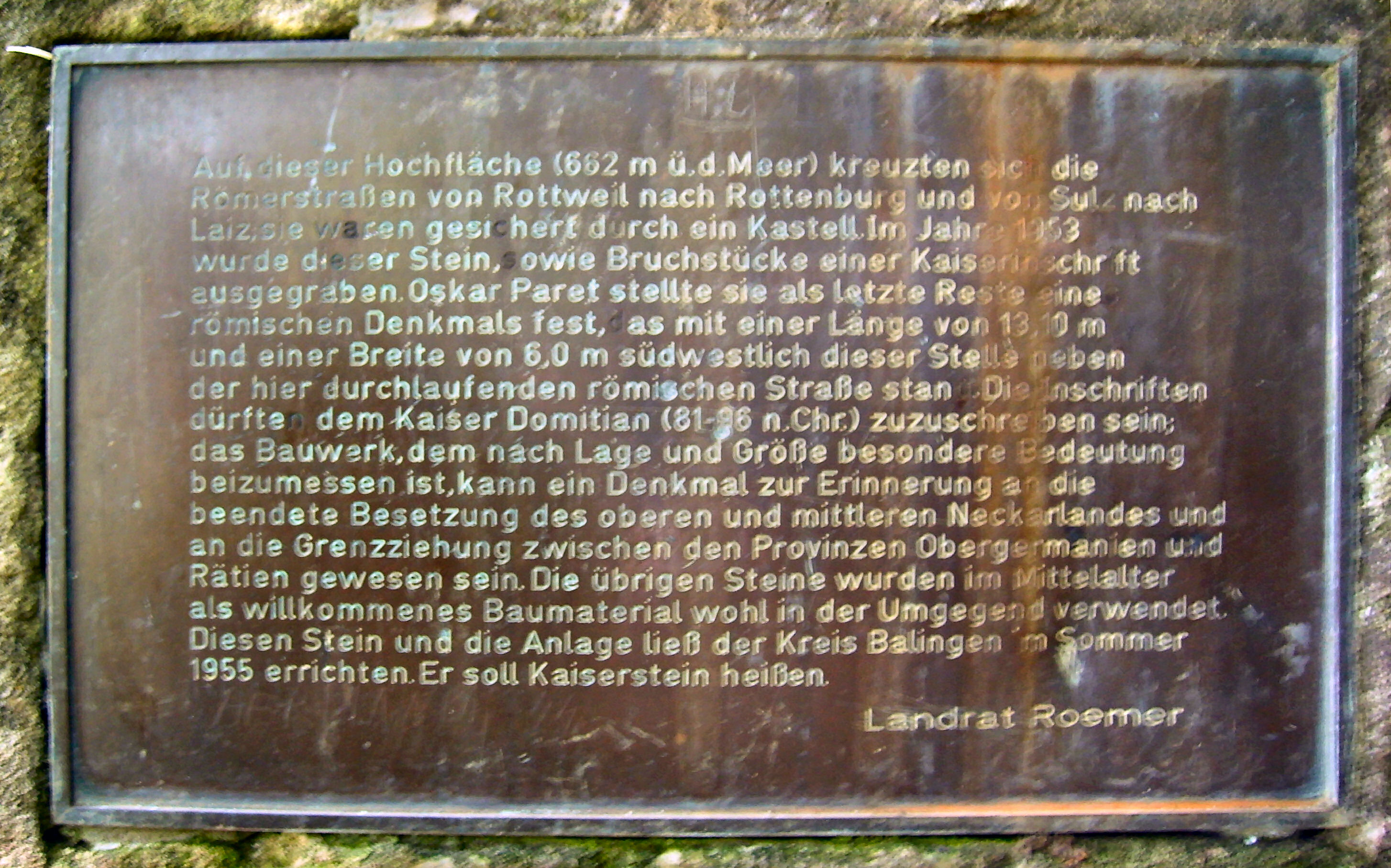 Kastell Geislingen/Häsenbühl Kaiserstein Gedenktafel